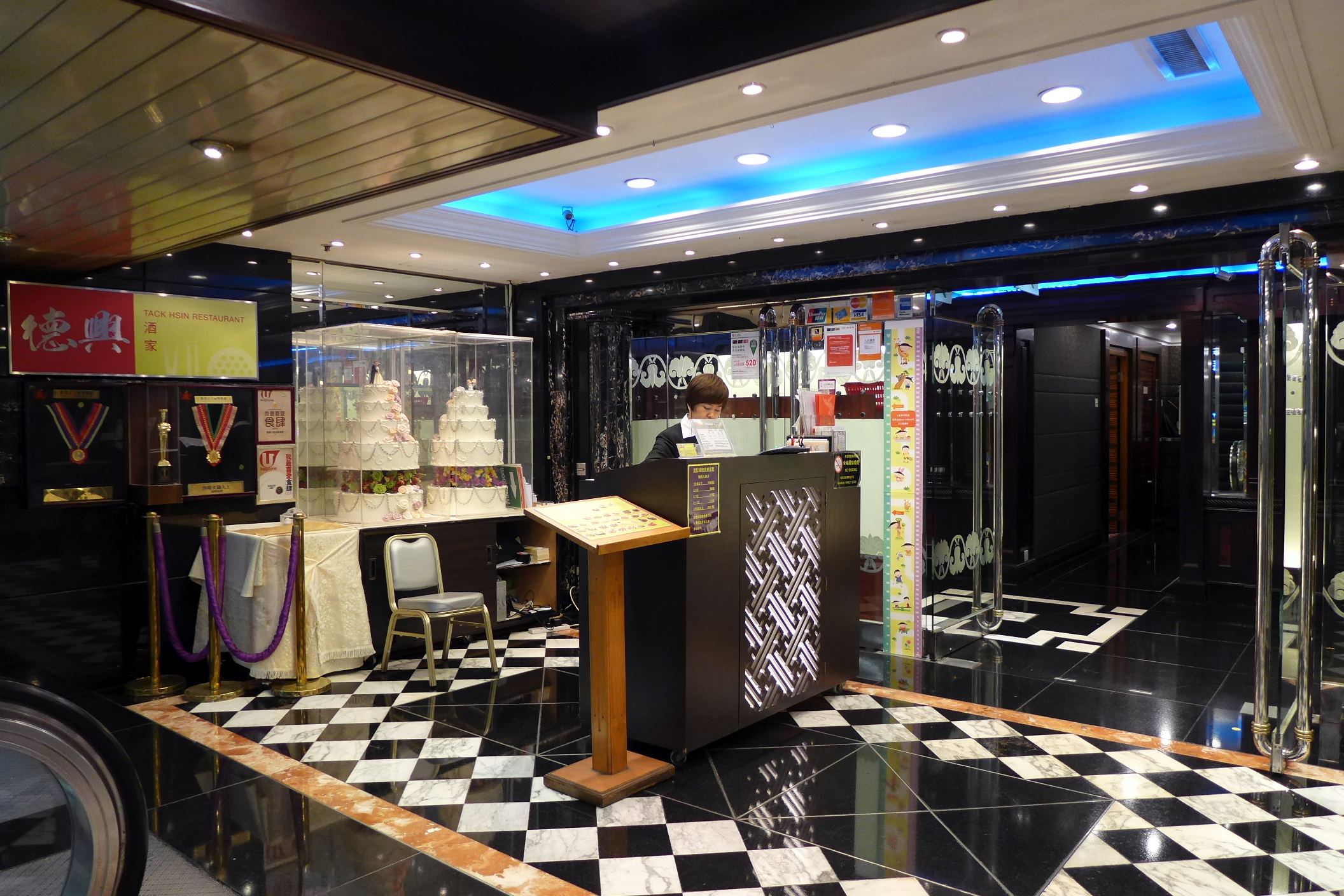 Tack Hsin Restaurant in ETST